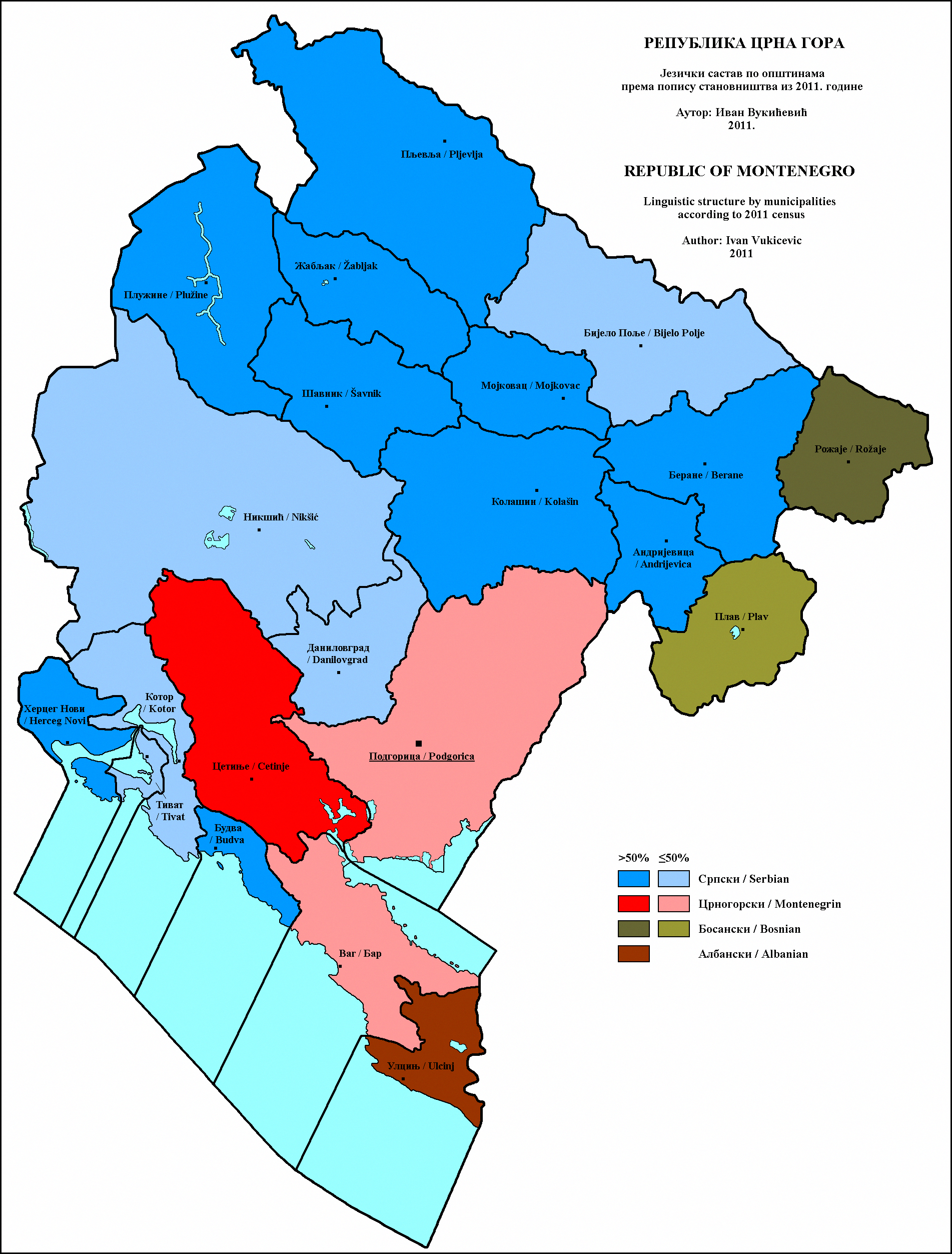 Језички састав Црне Горе по општинама 2011. године. Аутор: Иван Вукићевић